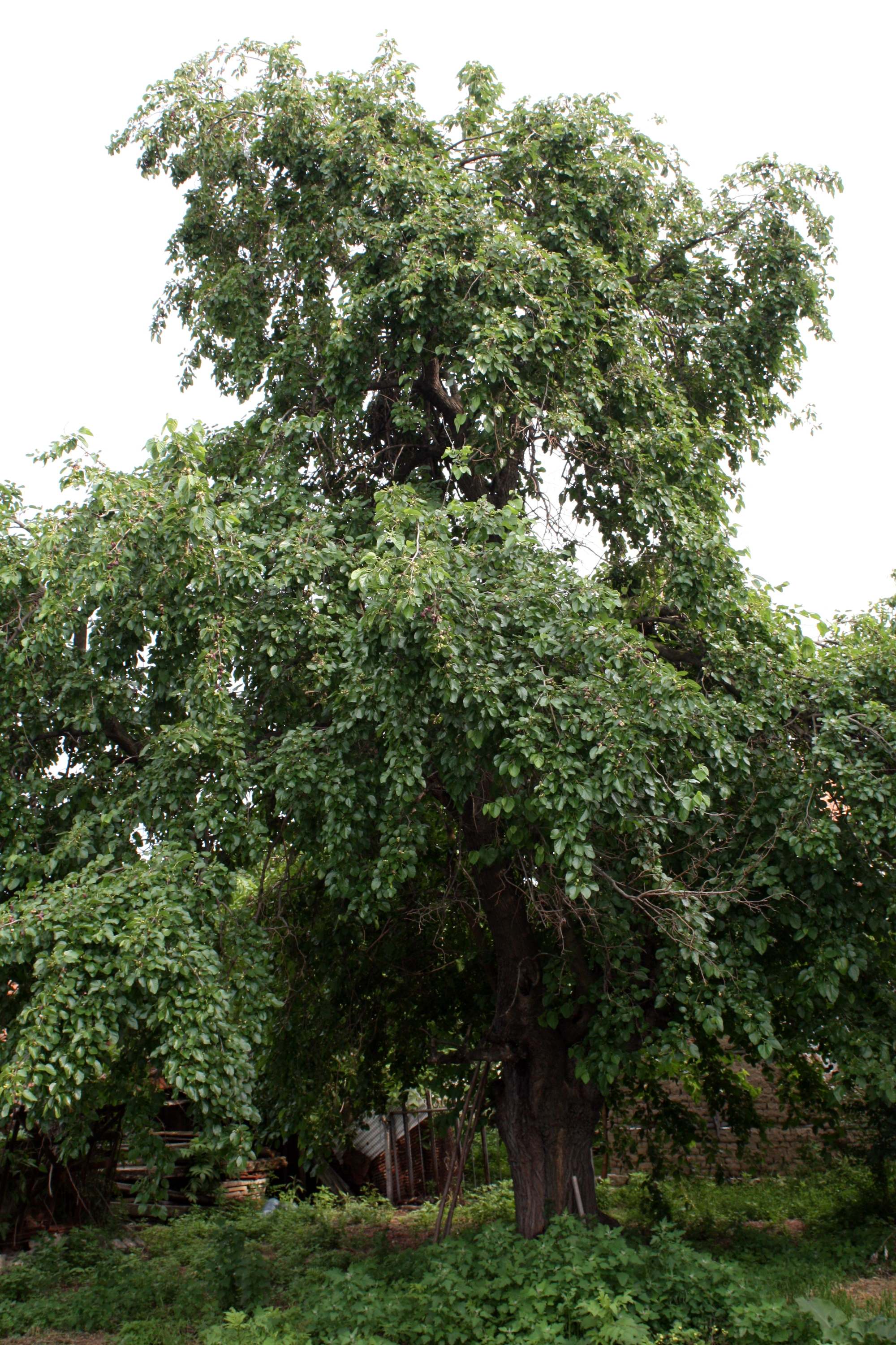 sehr alter Maulbeerbaum (Morus) in Bulgarien.